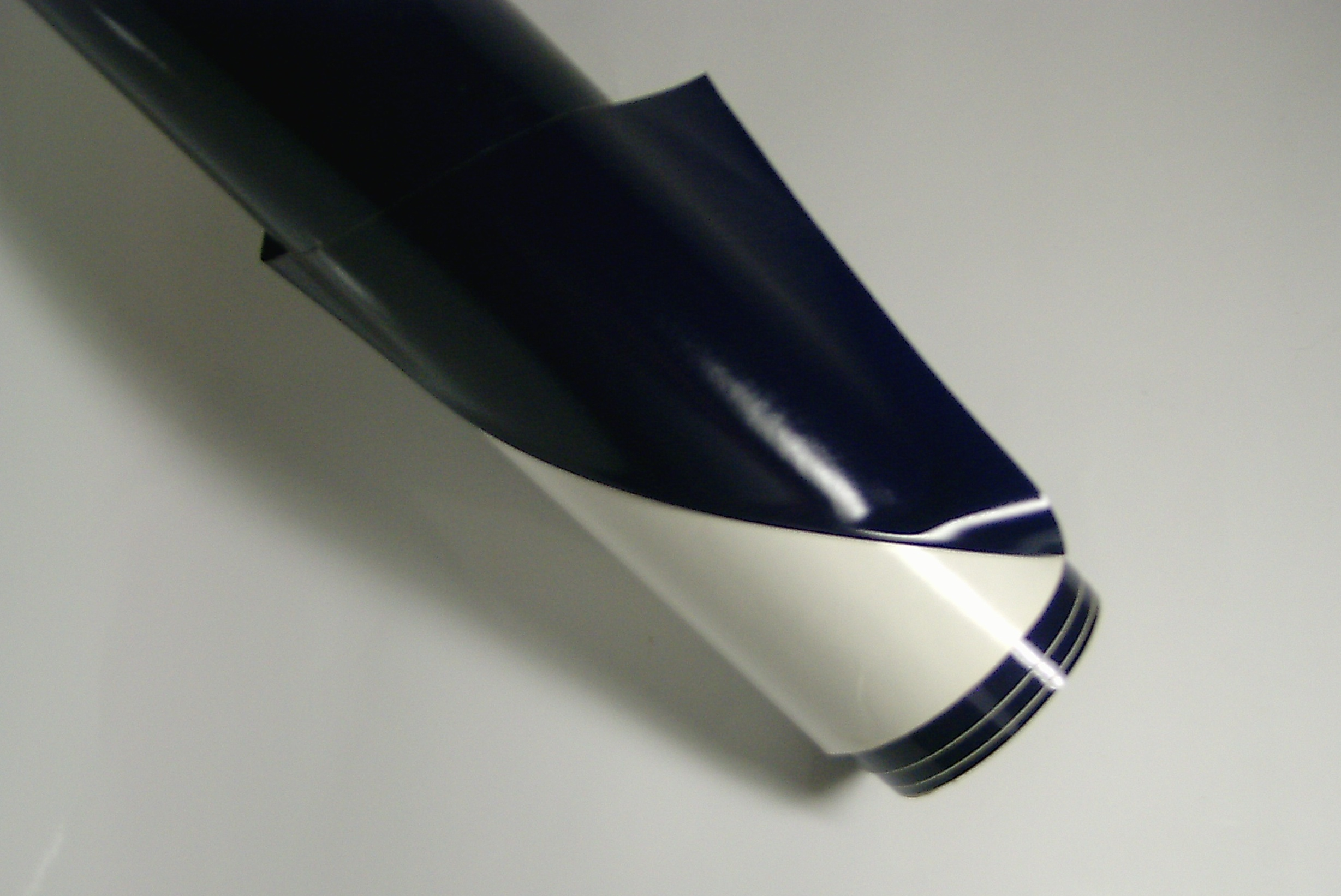 Beschriftungsfolie auf Trägerpapier , Alter ca. 5 Jahre. Die Schrumpfung der Folie ist an den weißen Bereichen, in denen das Trägerpapier sichtbar ist zu erkennen.